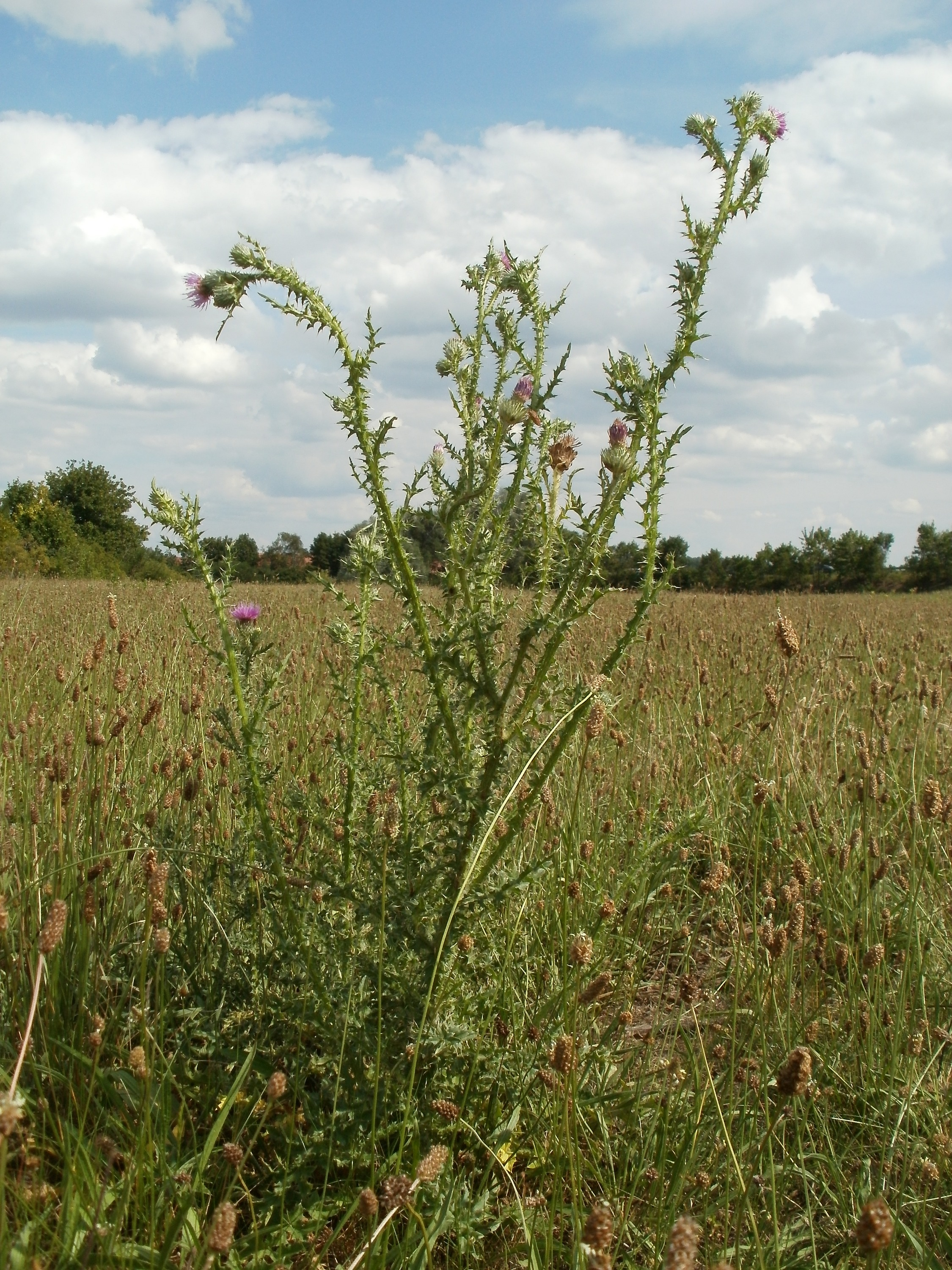 Weg-Distel (Carduus acanthoides) in Hockenheim